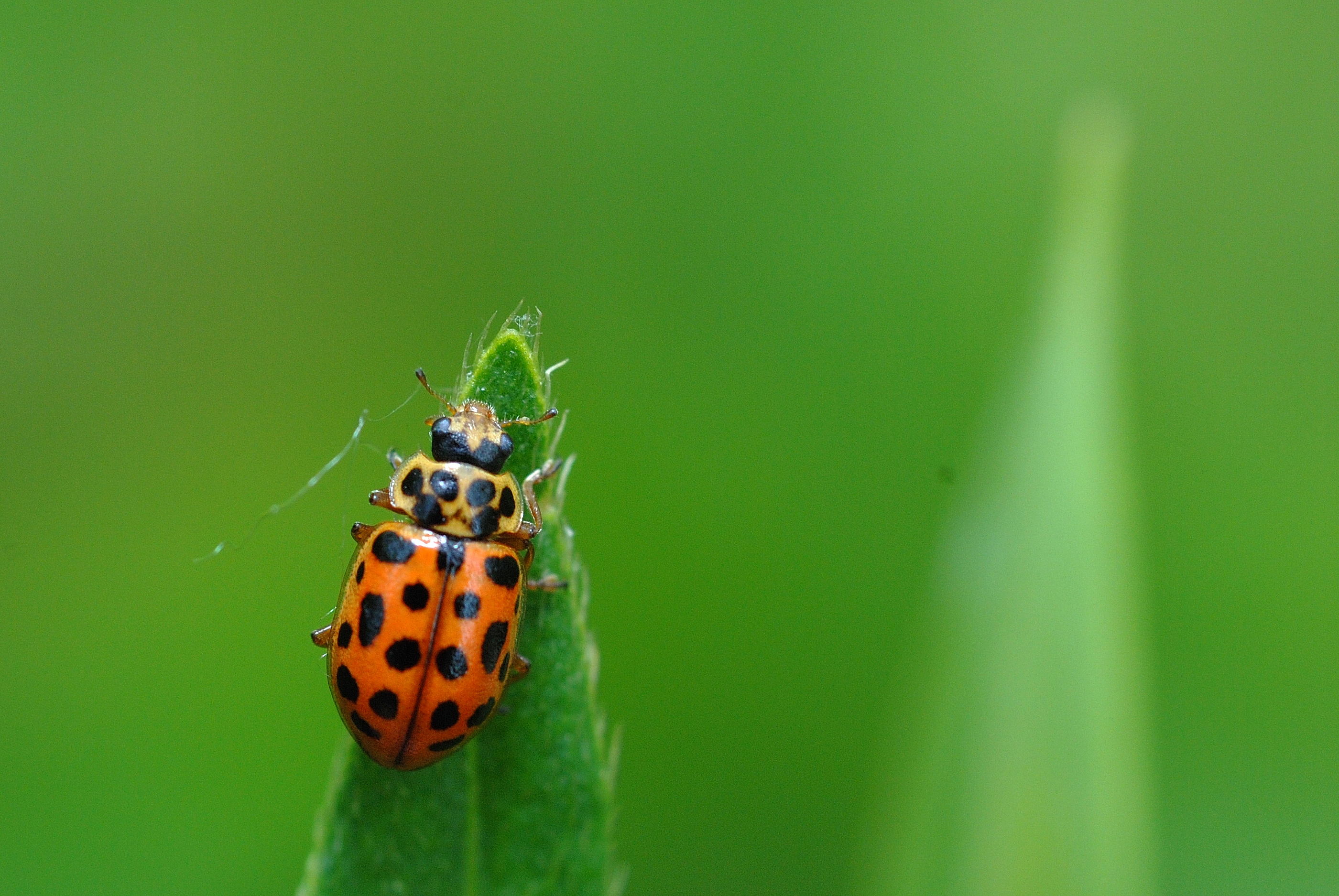 Anisosticta novemdecimpunctata